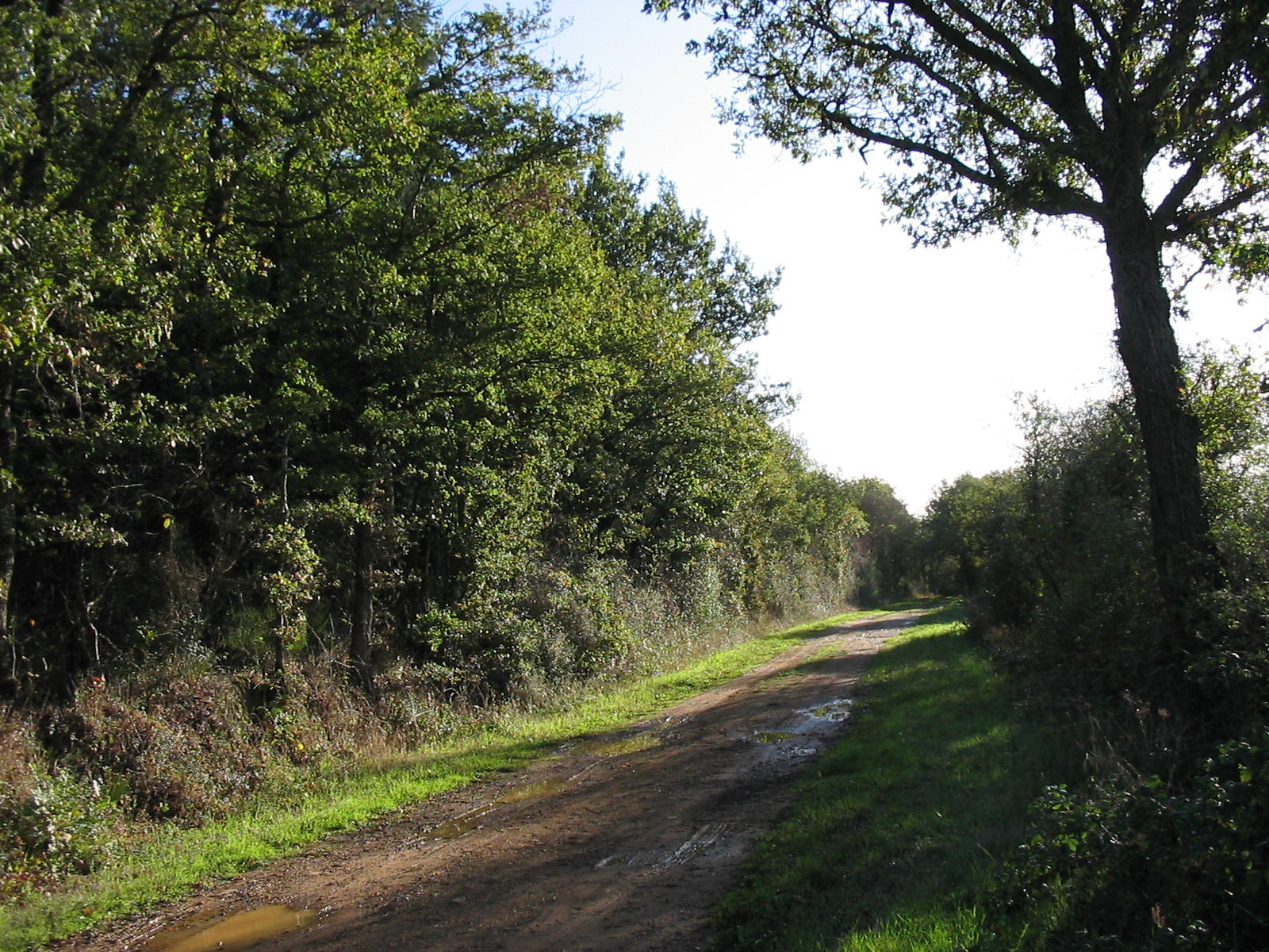 chemin des charbonniers, La Pouëze (49)